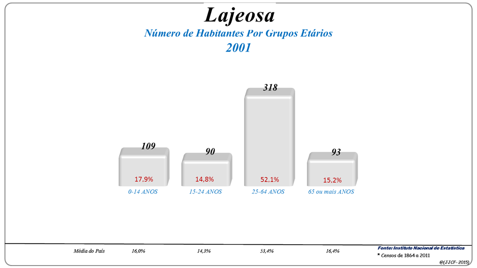 População